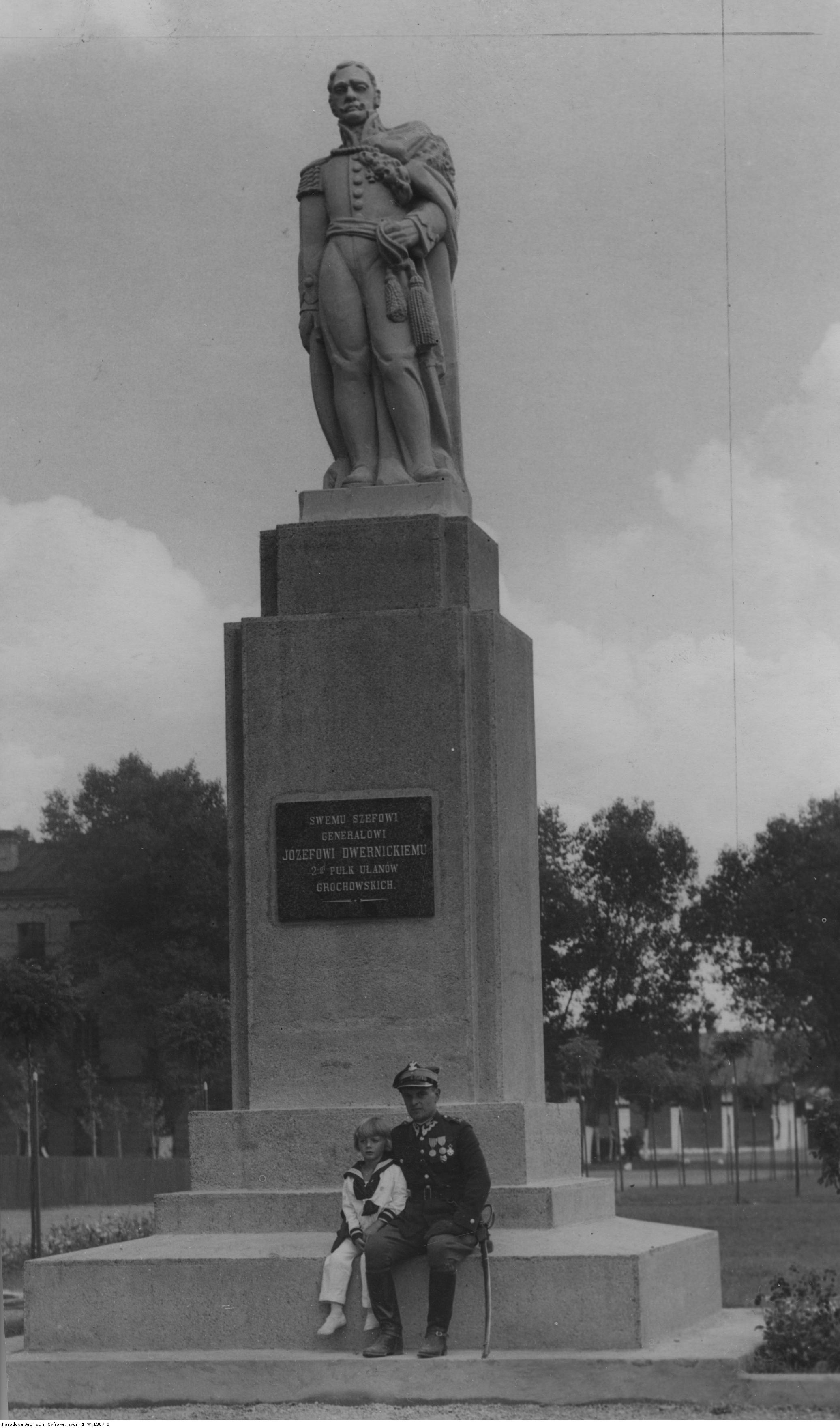 15-lecie 2 Pułku Ułanów Grochowskich w Suwałkach. Praprawnuk i prapraprawnuk gen. Józefa Dwernickiego pod pomnikiem ich przodka. Koncern Ilustrowany Kurier Codzienny - Archiwum Ilustracji. Sygnatura: 1-W-1387-8